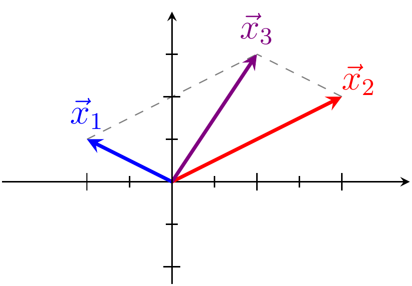 Dva označené vektory v rovině s vyznačeným působištěm, usazené v souřadné soustavě. Dále vyznačen jejich součet.